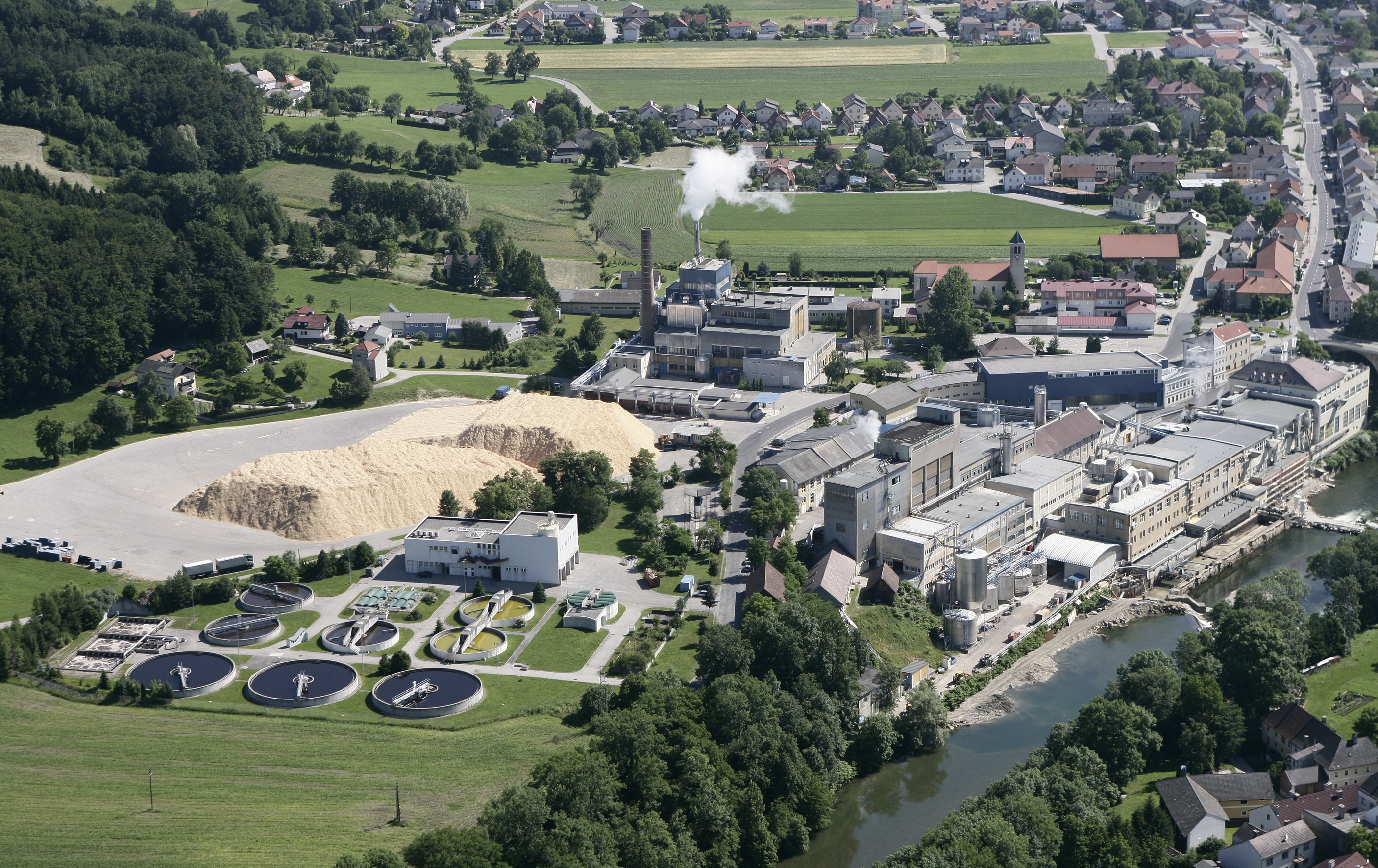 Ansicht der Firma Mondi Neusiedler (Werk Kematen)